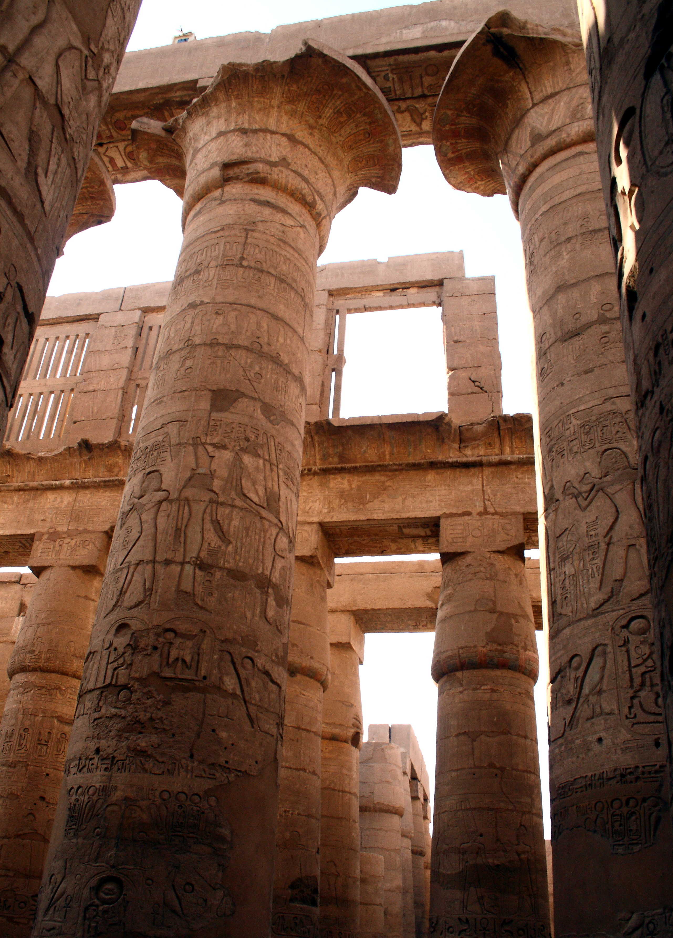 Karnak_temple